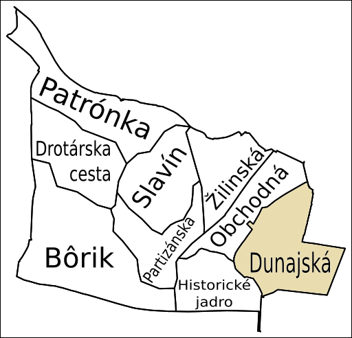 Oblasť Dunajská, Staré Mesto, Bratislava